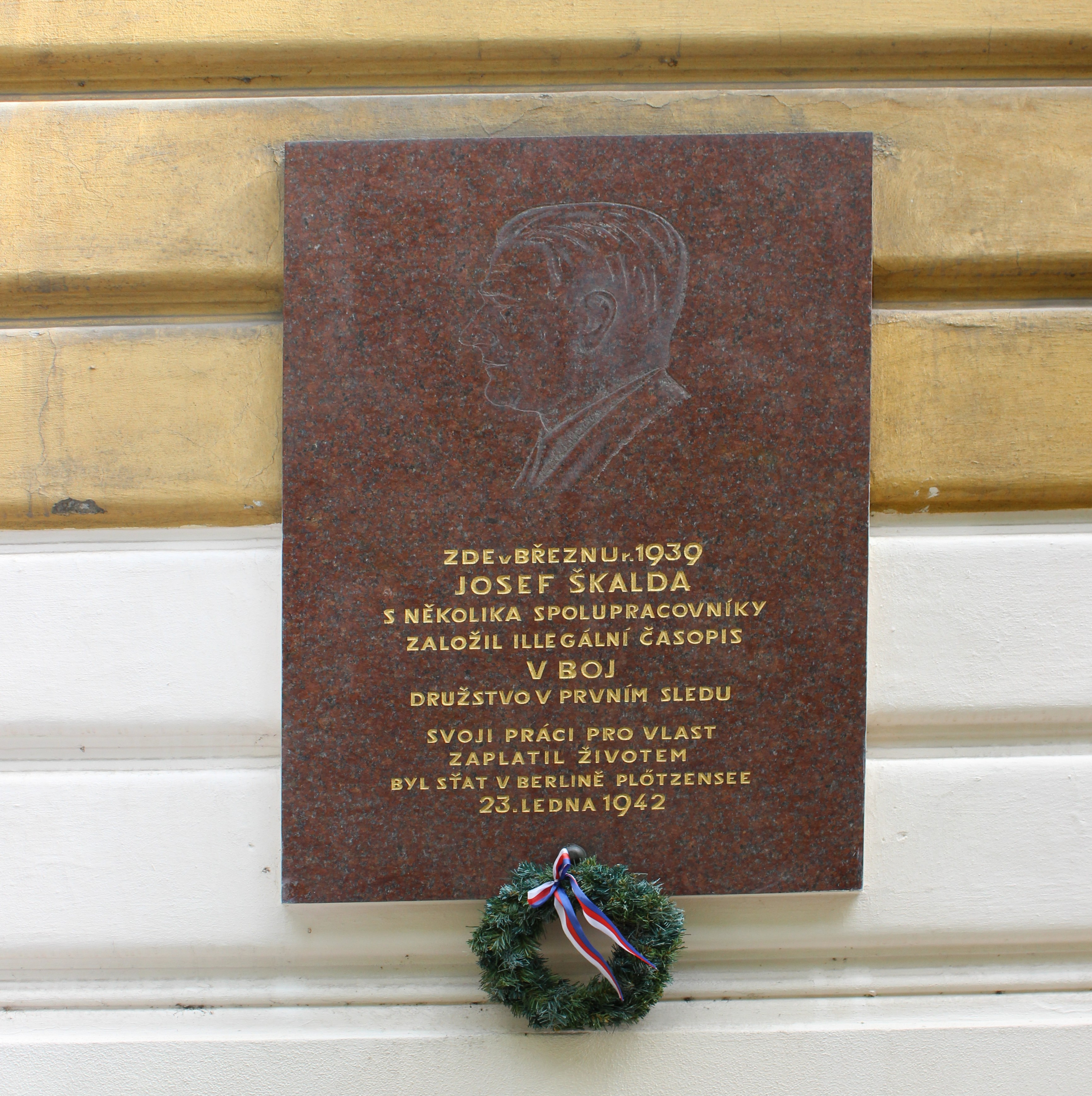 Pamětní deska Josefa Škaldy na domě číslo popisné 1026 na pražských Vinohradech.